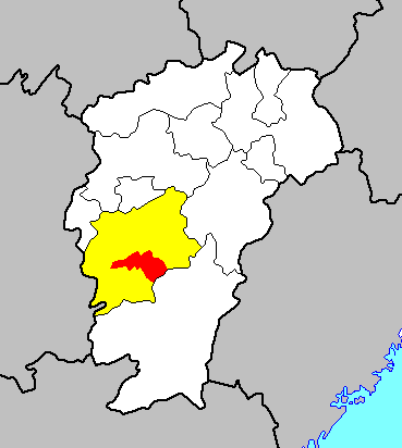 泰和县在江西省及吉安市的位置